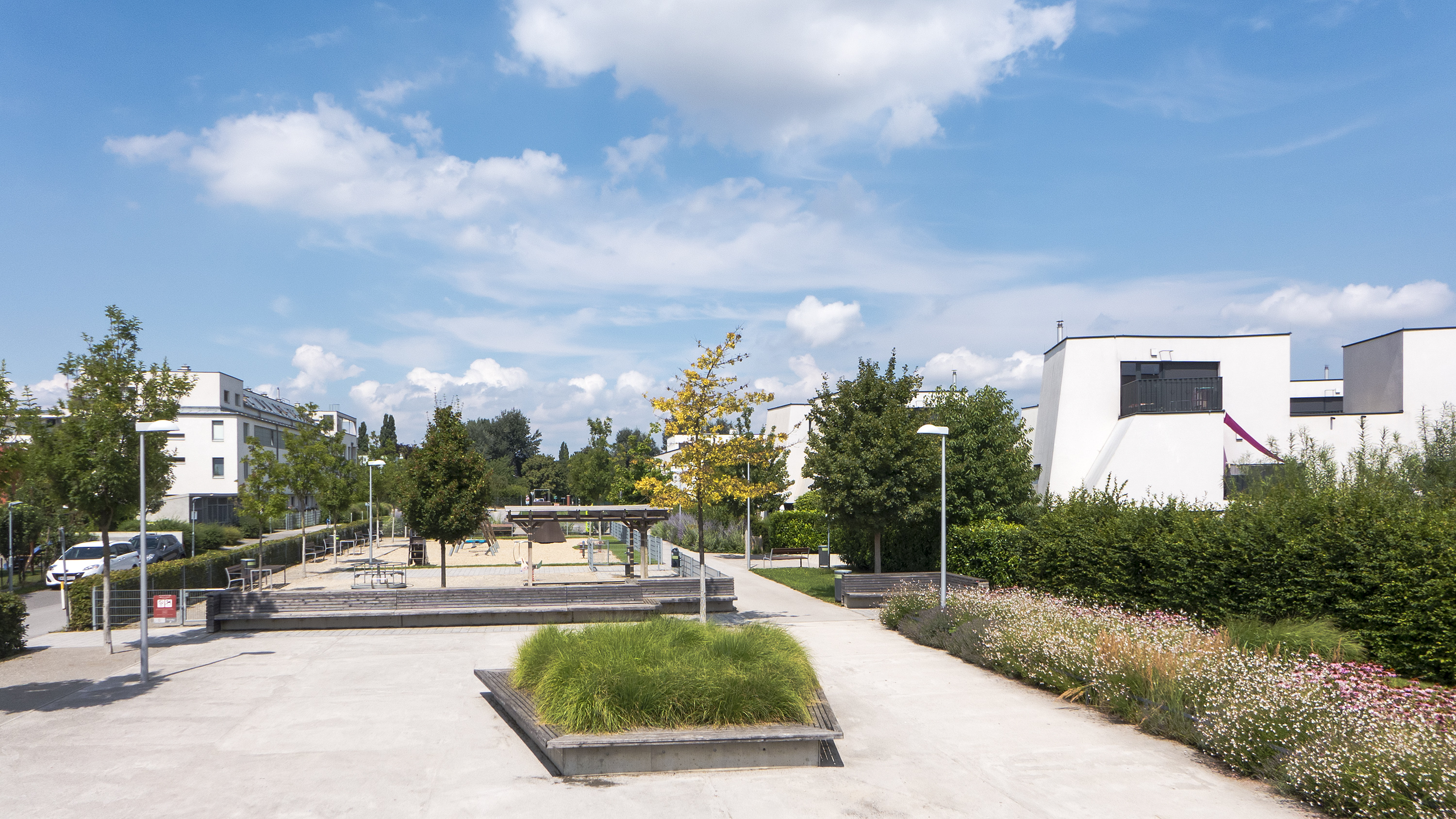 Lumbyepark in Wien 22